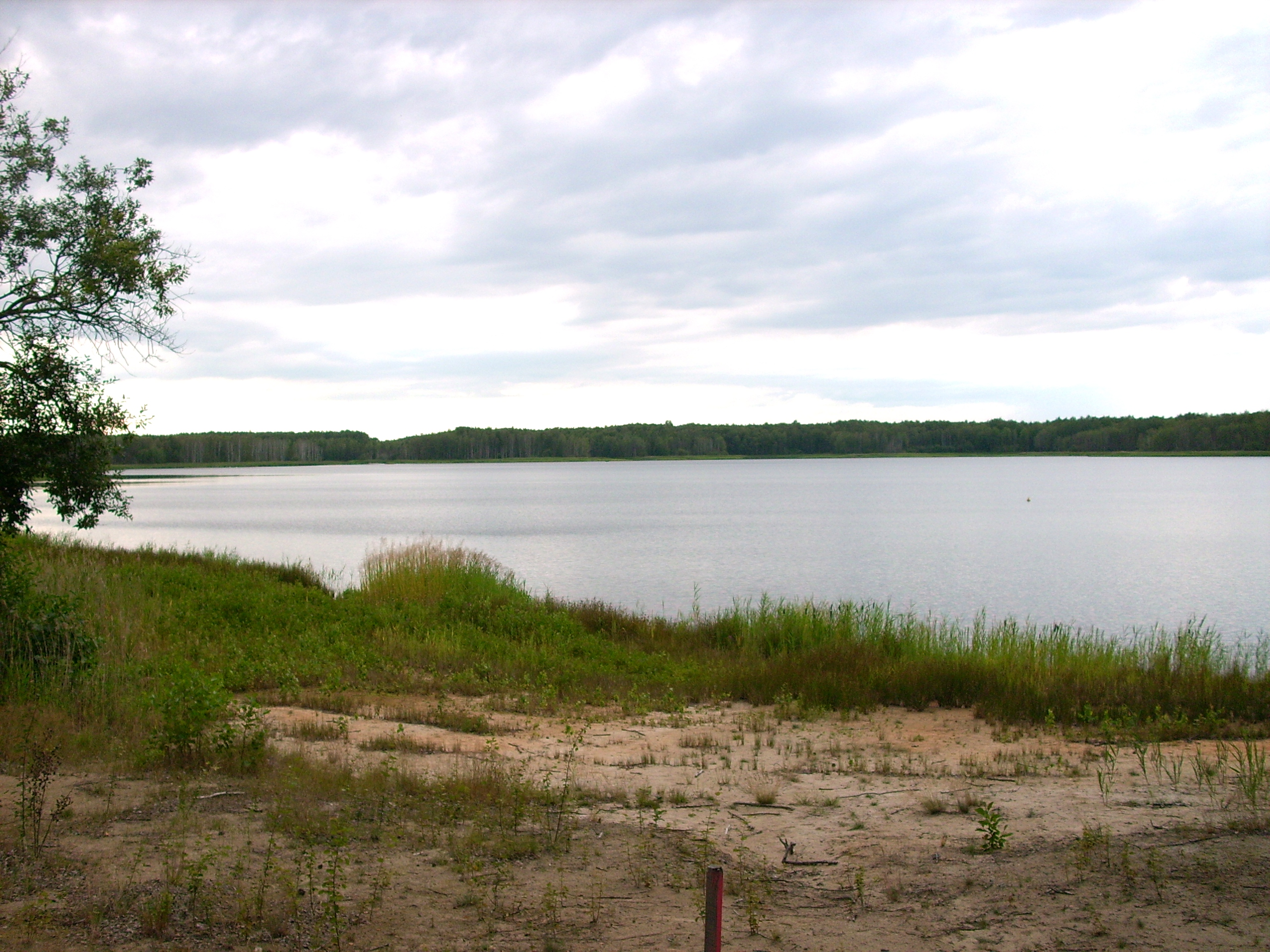 Silbersee bei Lohsa Hornjoserbsce: Slěborny jězor pola Łaza